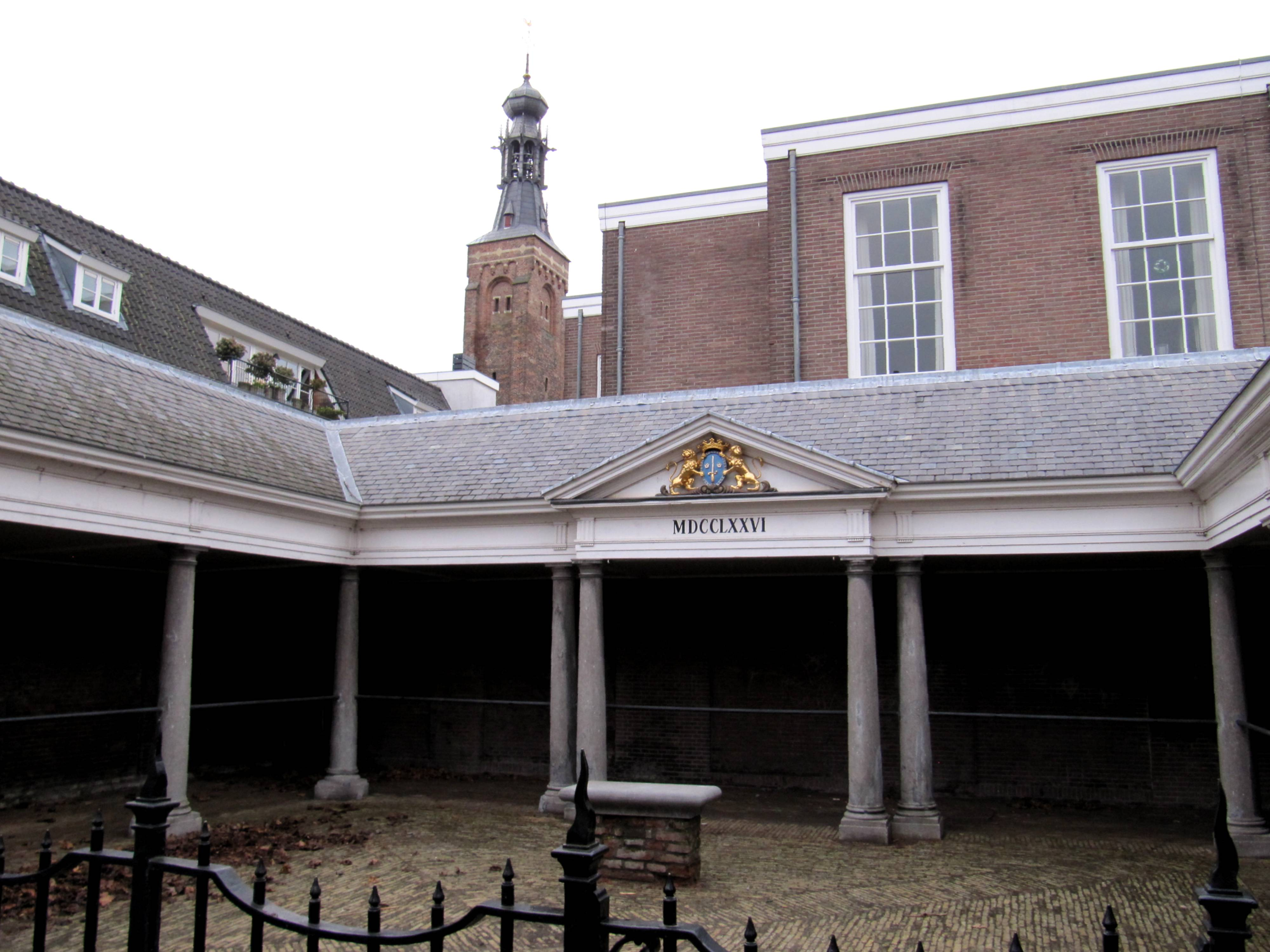 In 1766 door C. van Leeuwen gebouwde vishal, bestaande uit drie vleugels rond een binnenpleintje, dat door een ijzeren hek van de straat gescheiden wordt. De drie vleugels worden gedekt door schilddaken en zijn naar het pleintje geopend als galerijen met hardstenen dorische zuiltjes, die een houten hoofdgestel dragen. De middentravee van de terugliggende vleugel draagt een houten fronton met het stadswapen en het jaartal 1776.